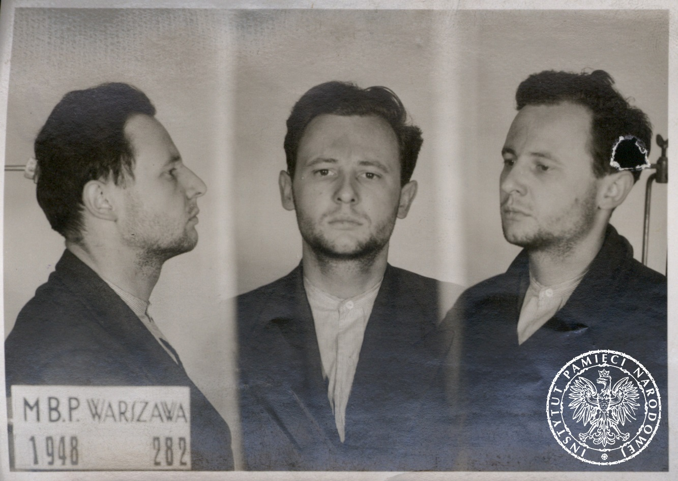 Zdjęcie sygnalityczne wykonane po zatrzymaniu Władysława Śliwińskiego przez Urząd Bezpieczeństwa